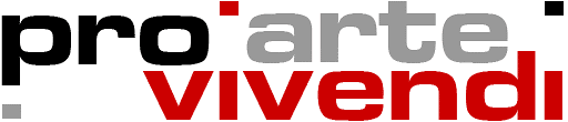 Logo des Kunstvereins pro arte vivendi